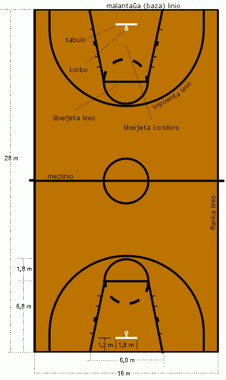 Skizo de korbopilkejo, el la usona vikipedio adaptita per GIMP. Ĝi baziĝas sur :Dosiero:Basketball court dimensions.png, kiu estas publika havaĵo.